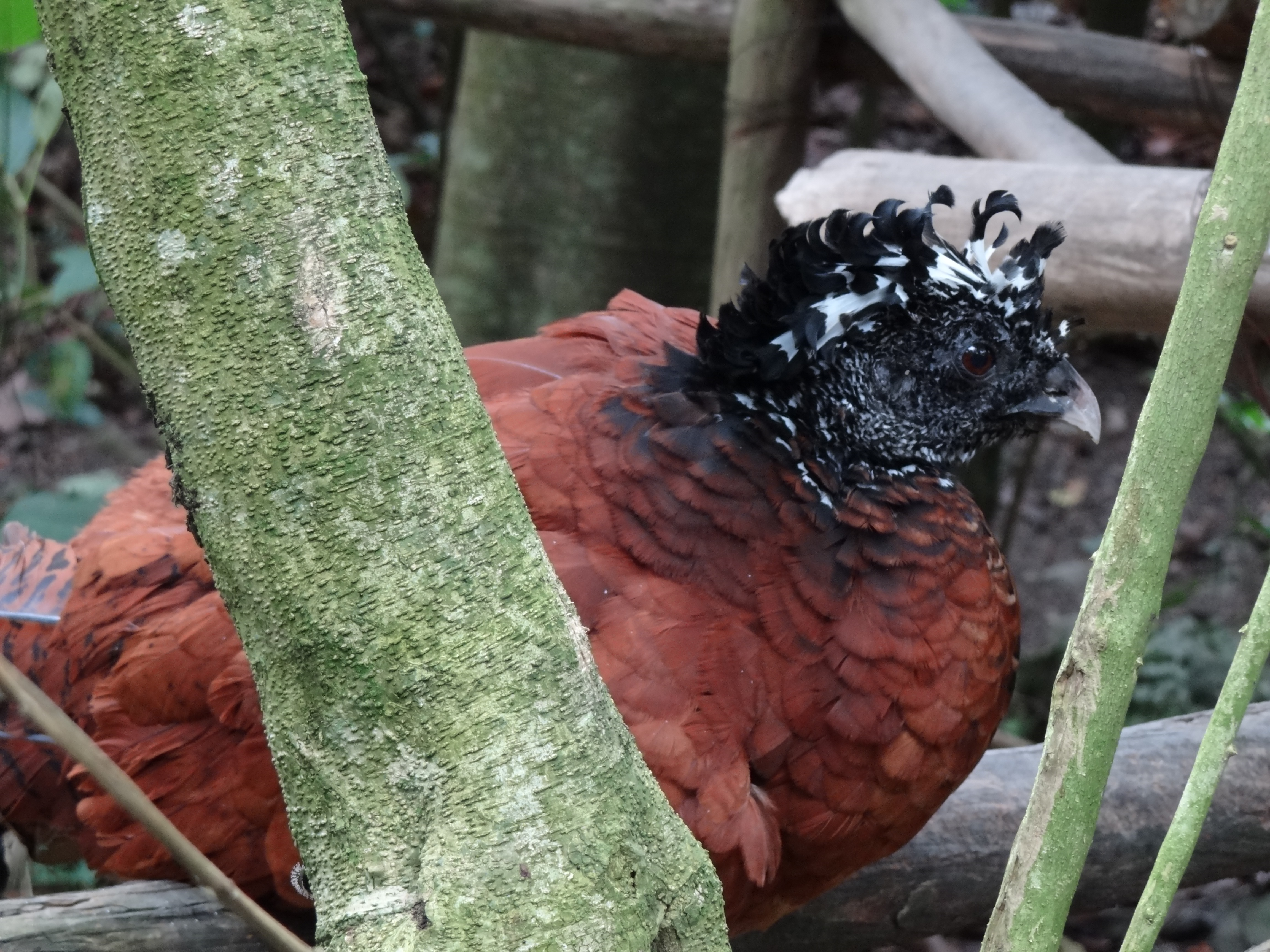 Paujil centroamericano hembra (Crax rubra) en el Zoológico de Santacruz, Cundinamarca, Colombia.